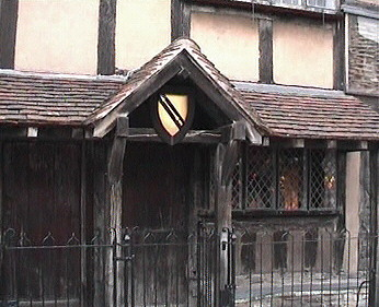 Shakespeare's Birthplace Stratford